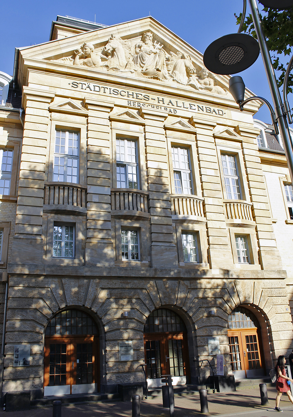 Das Herschelbad Mannheim beherbergt die FKAM -Freie Kunstakademie Mannheim